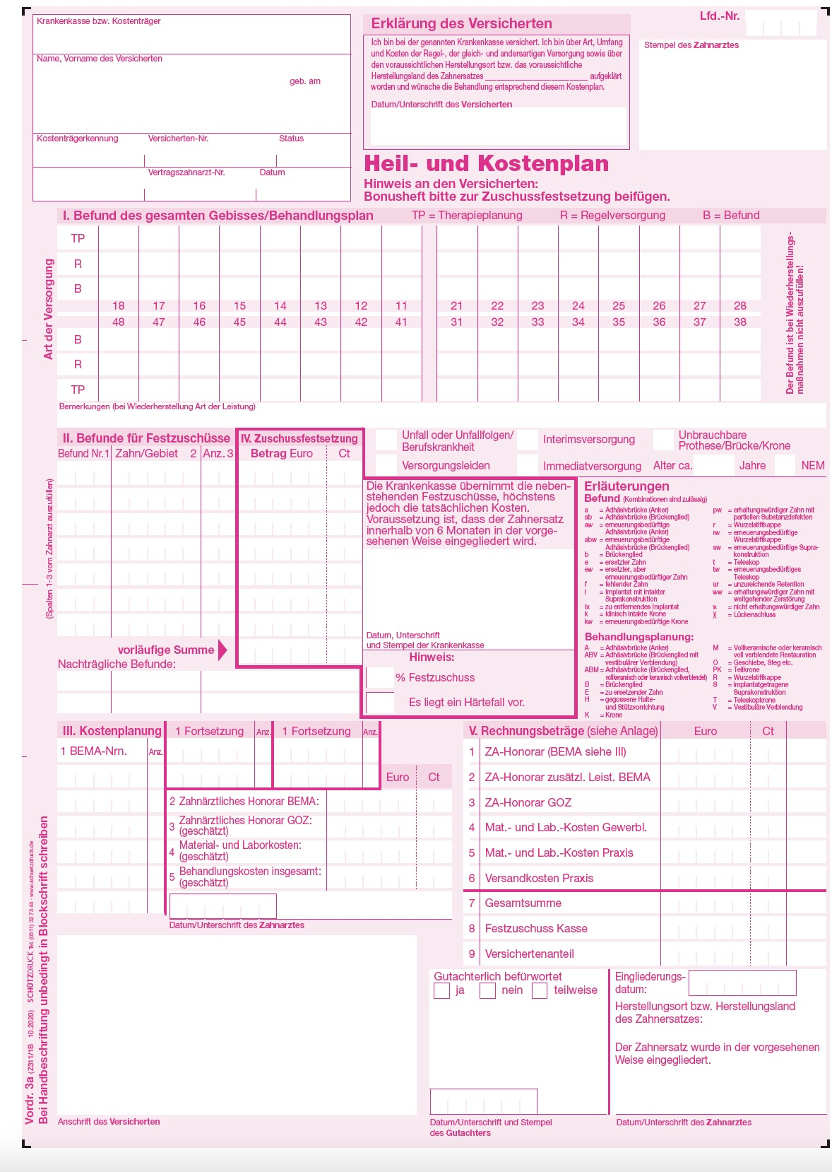 Heil- und Kostenplan (Seite 1) für Gesetzlich Versicherte in Deutschland (ist in dieser Form nicht mehr gültig)